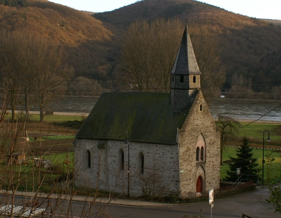 Peterskapelle von der Umgehung aufgenommen (2005)